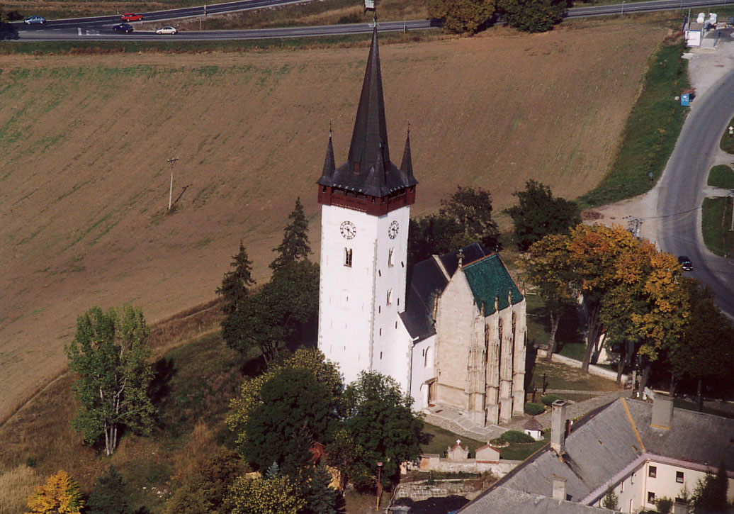 Church - Csütörtökhely - Slovakia - Europe